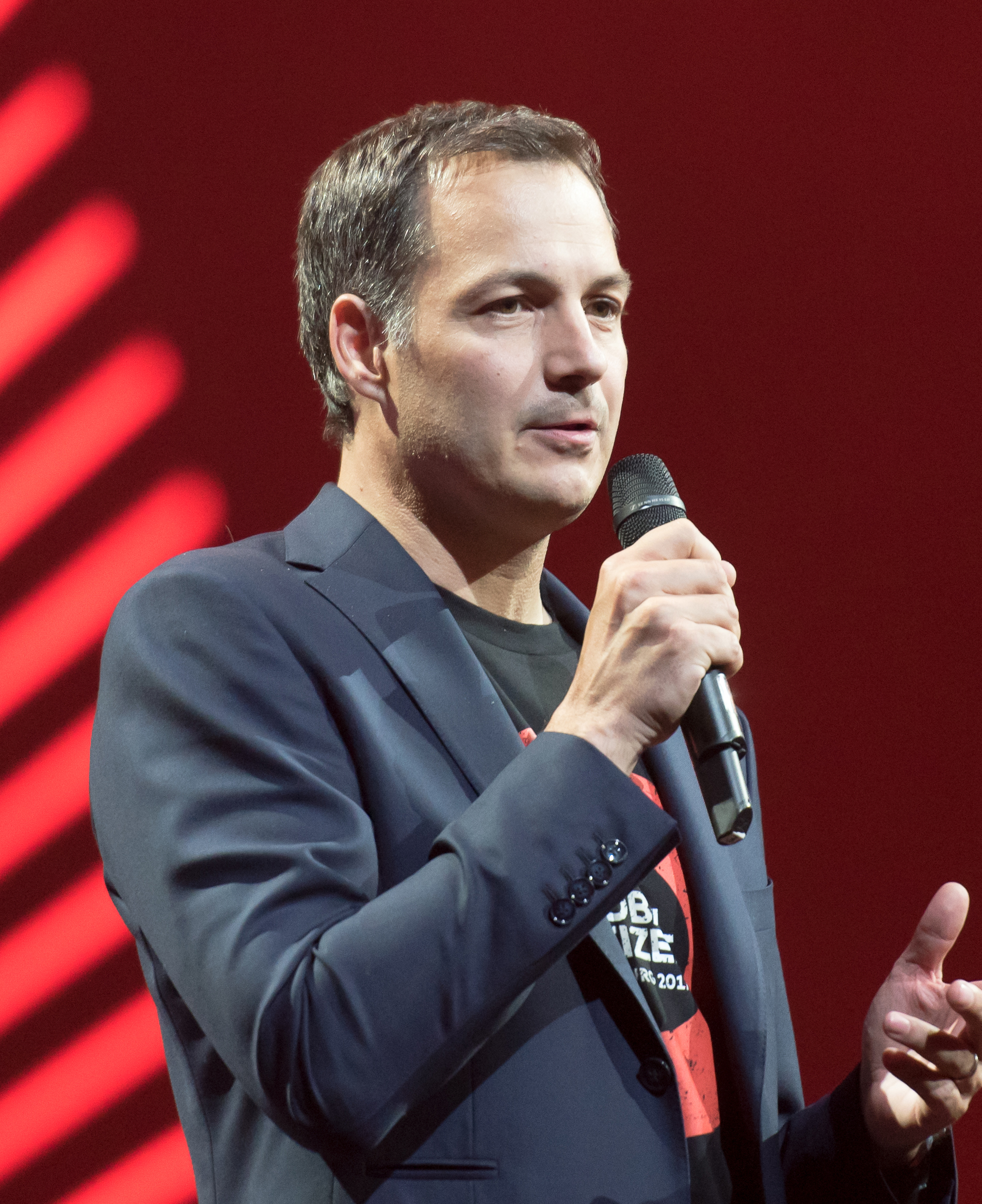 Alexander De Croo beim Clobal Citizen Festival in Hamburg